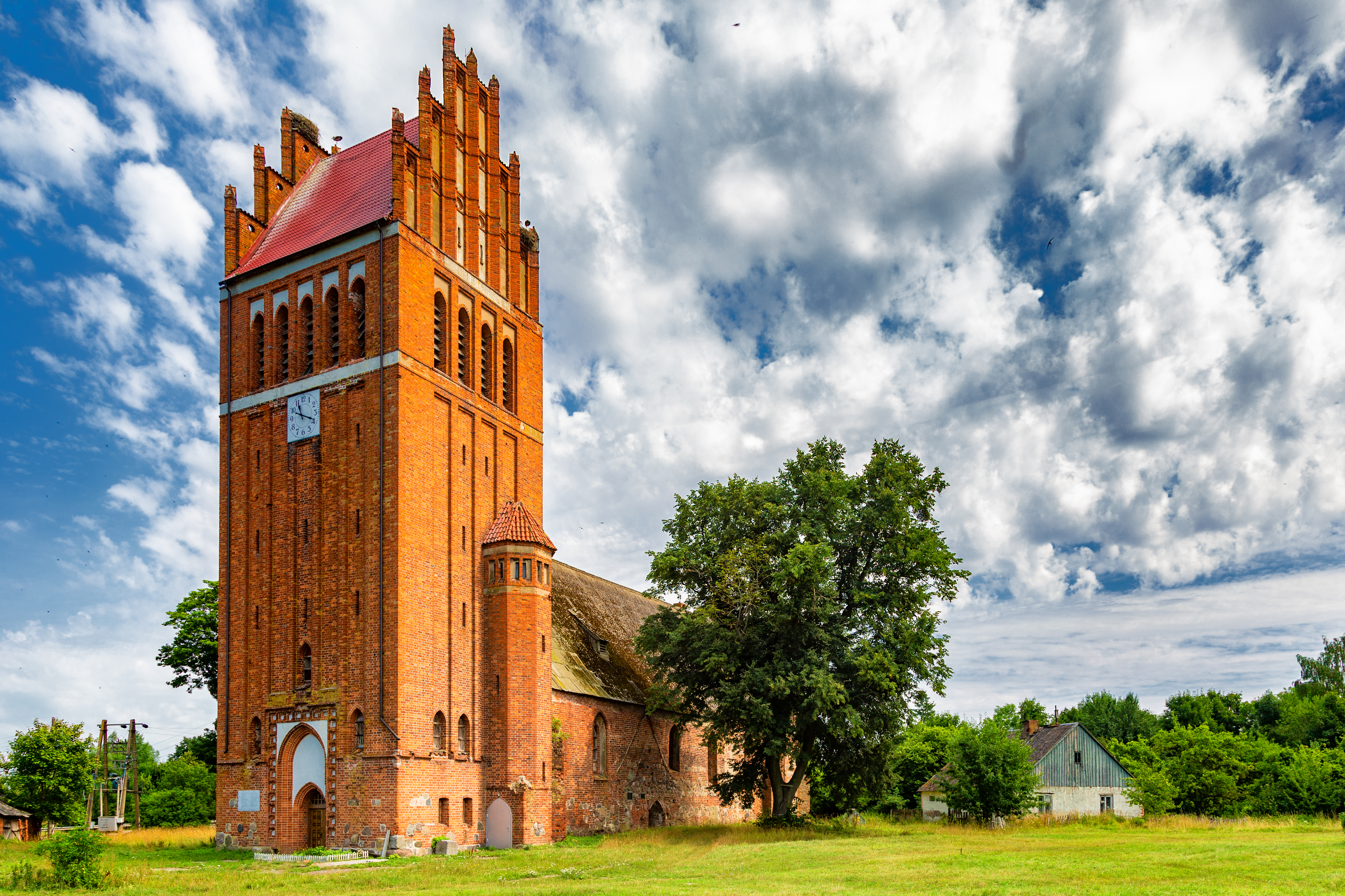 Кирха приходская: Дружба, Правдинский район, Калининградская область